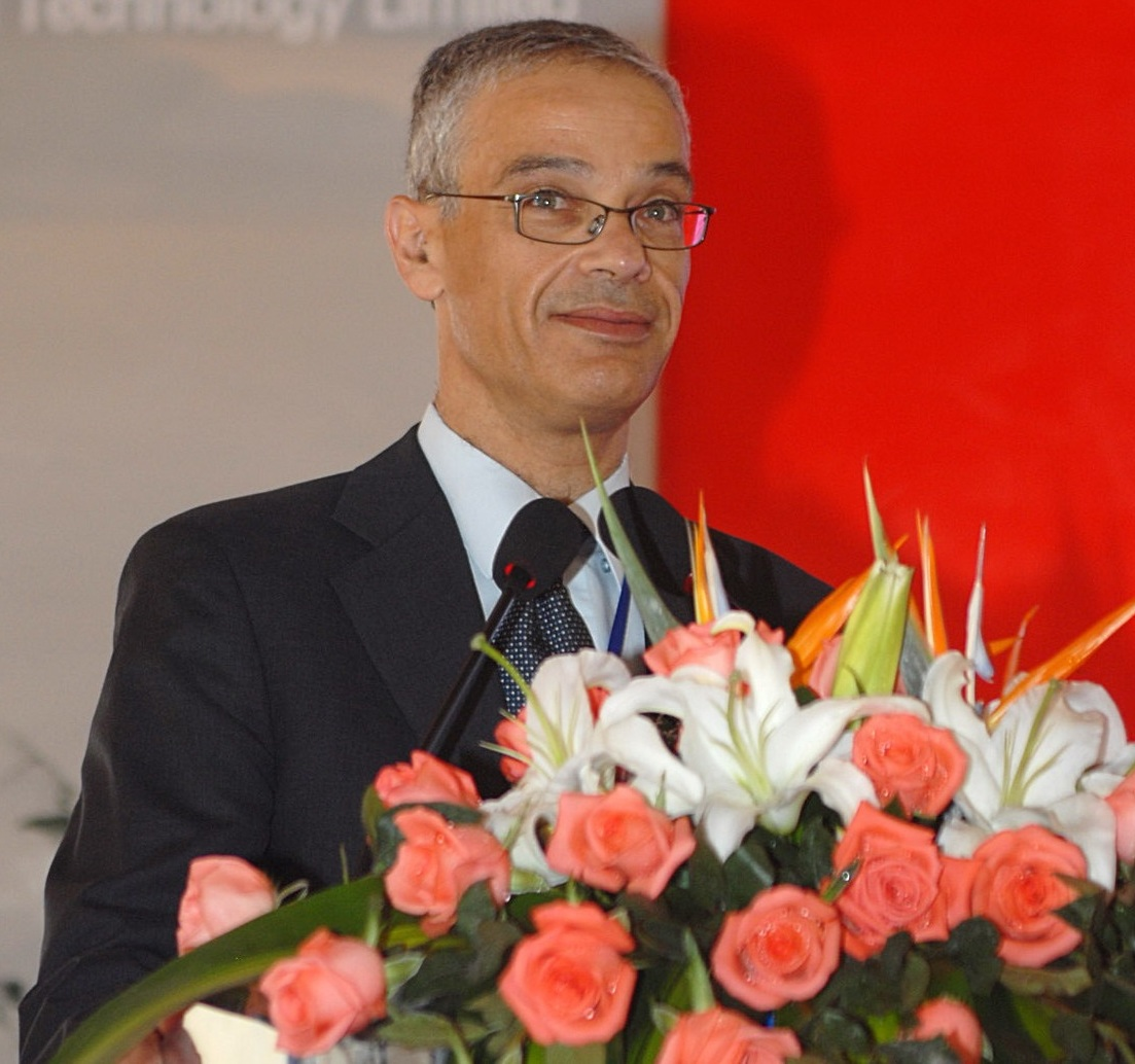 דוד מנדלוביץ בביקור בסין